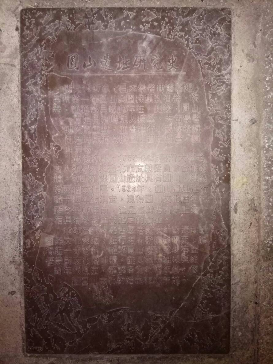 臺北市圓山捷運站外往淡水方向，原兒童育樂中心外人行道